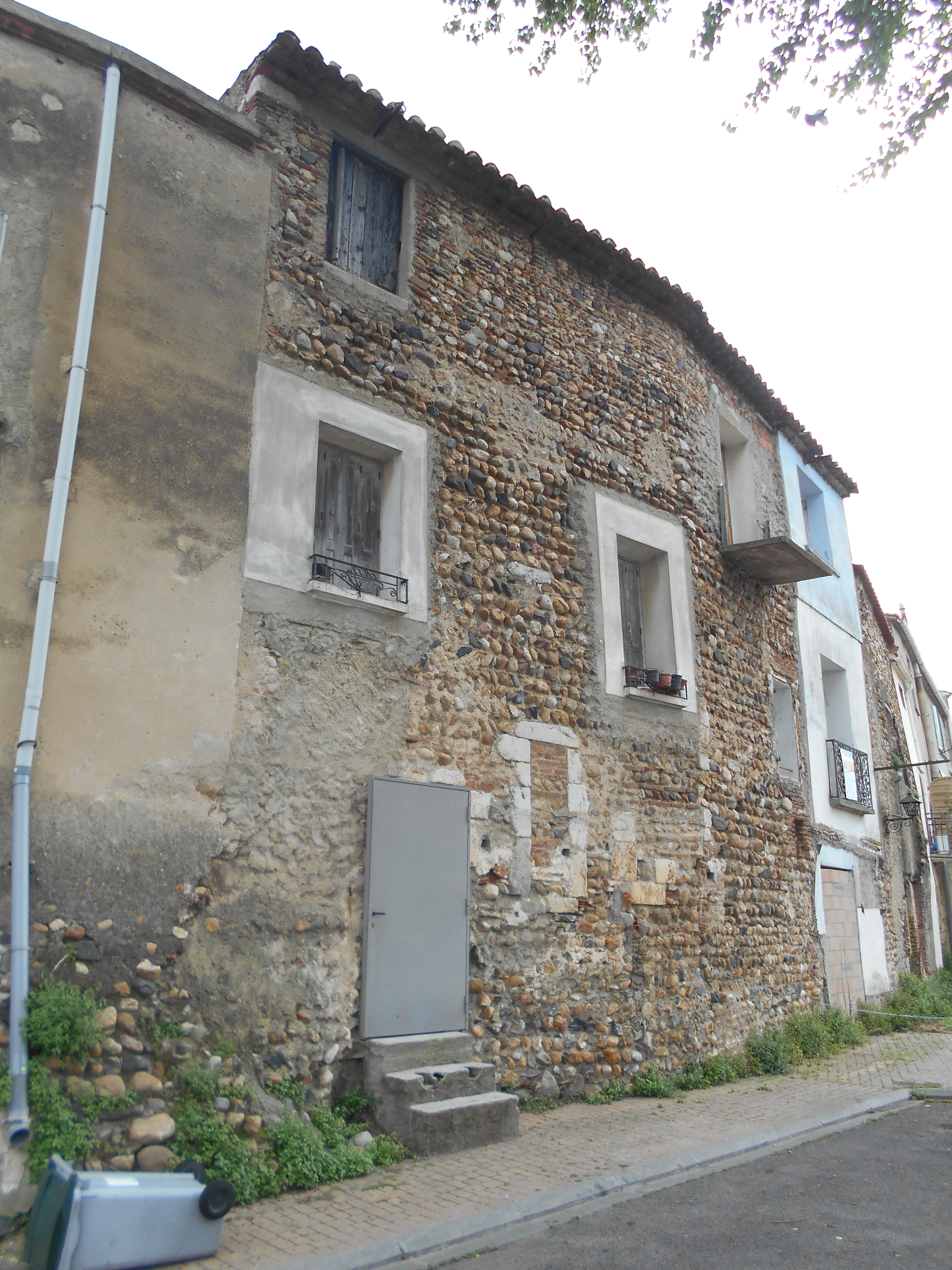 Muralles de Ribesaltes. Tram septentrional